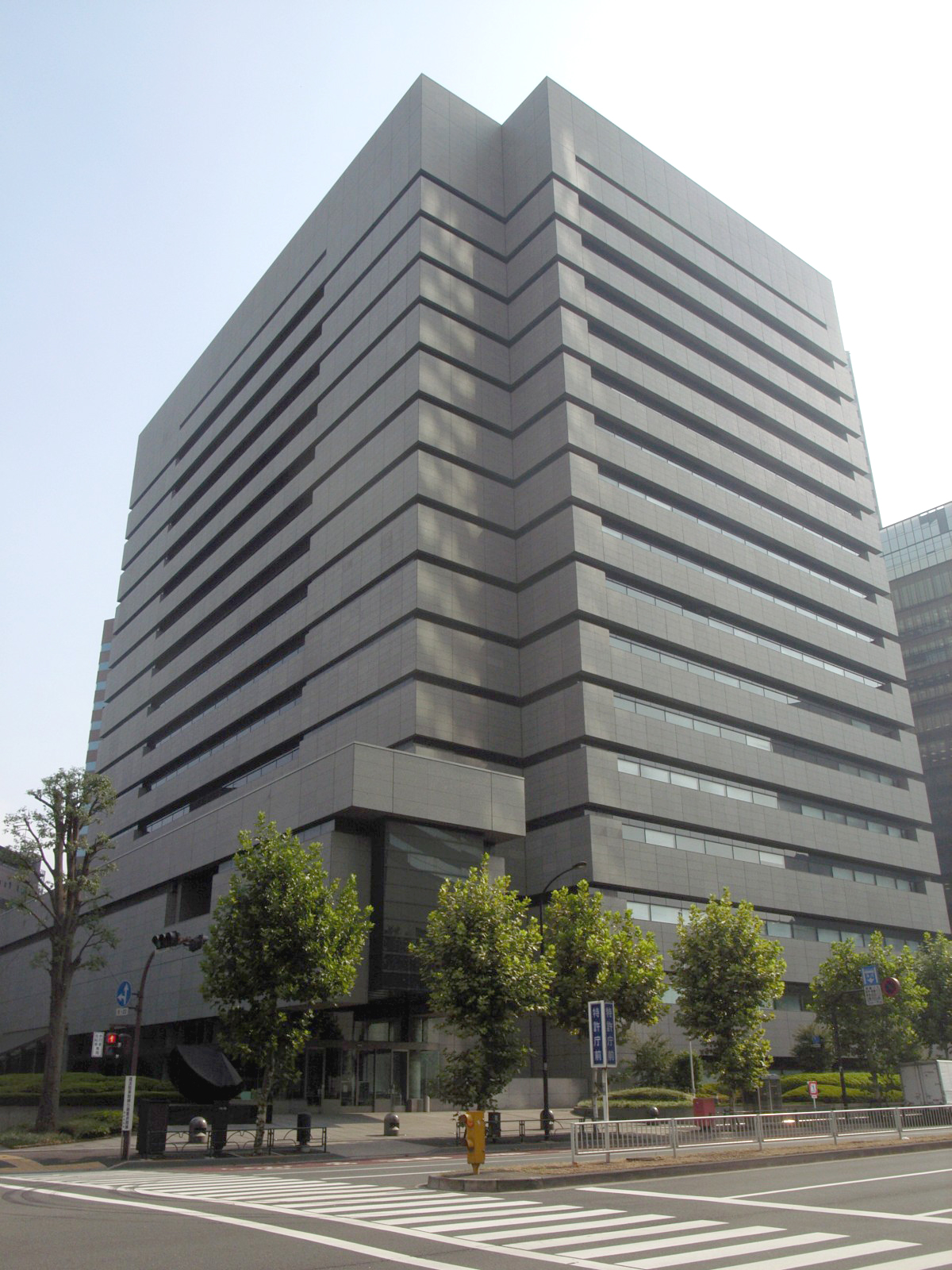 Patent Office Building, Kasumigaseki, Tokyo, Japan / 特許庁総合庁舎